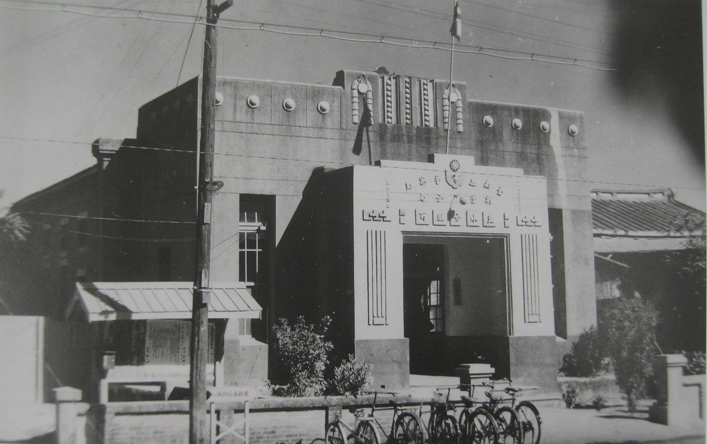 二次大戰後作為鹽水分駐所的鹽水公會堂